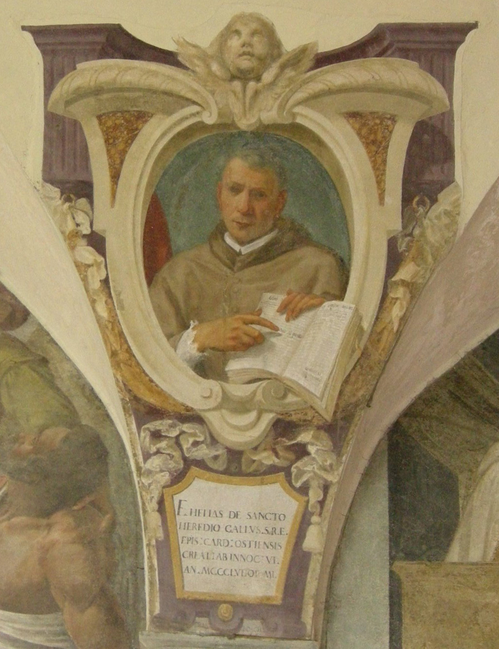 Chiostro di ognissanti, personalità francescane 21 Élie de Saint-Yrieux